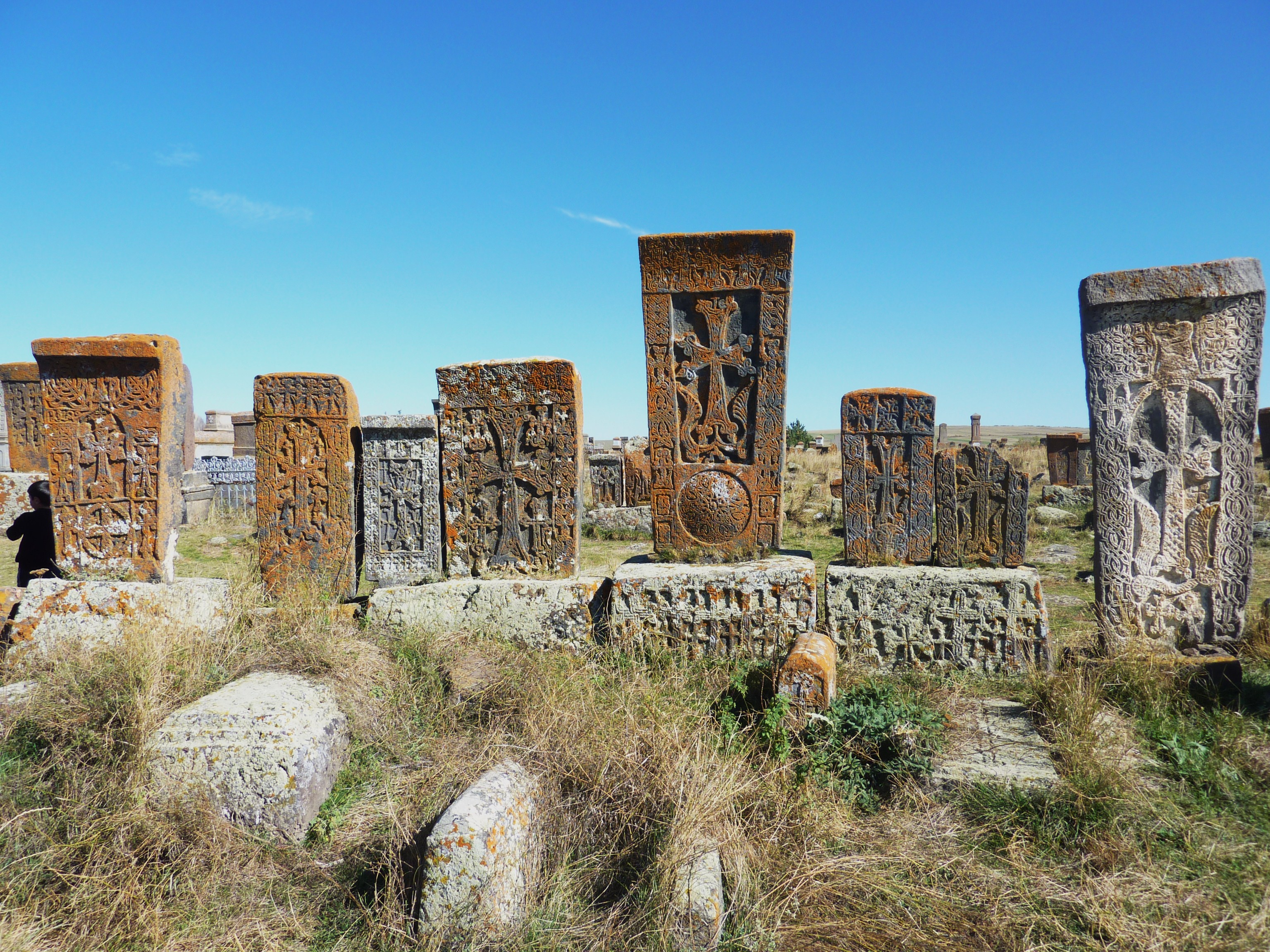 Cimetière de Noradouz: vue d'ensemble des khatchkars